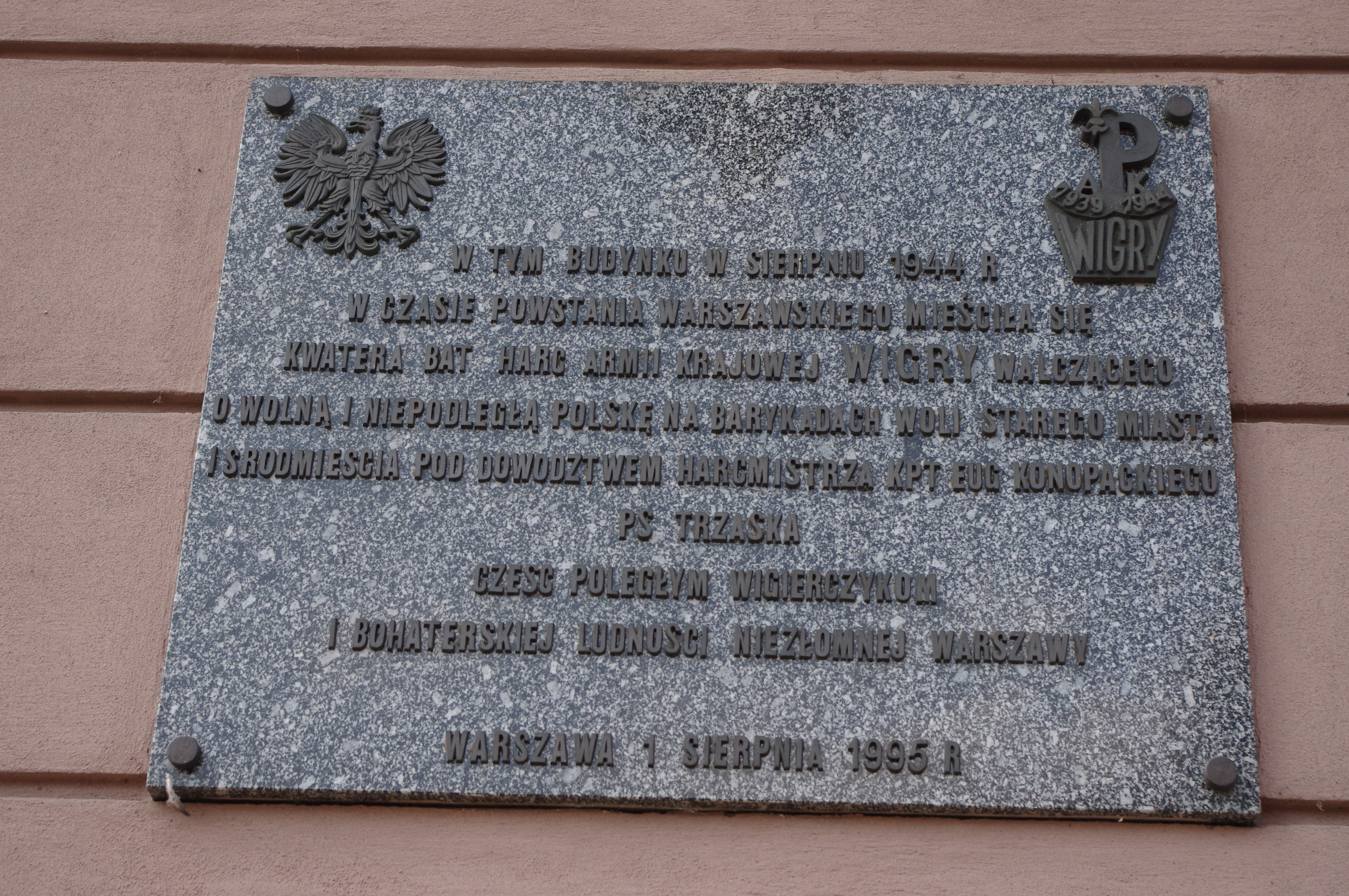 Tablica upamiętniająca Eugeniusza Konopackiego i Batalion Wigry na Pałacu Raczyńskich w Warszawie